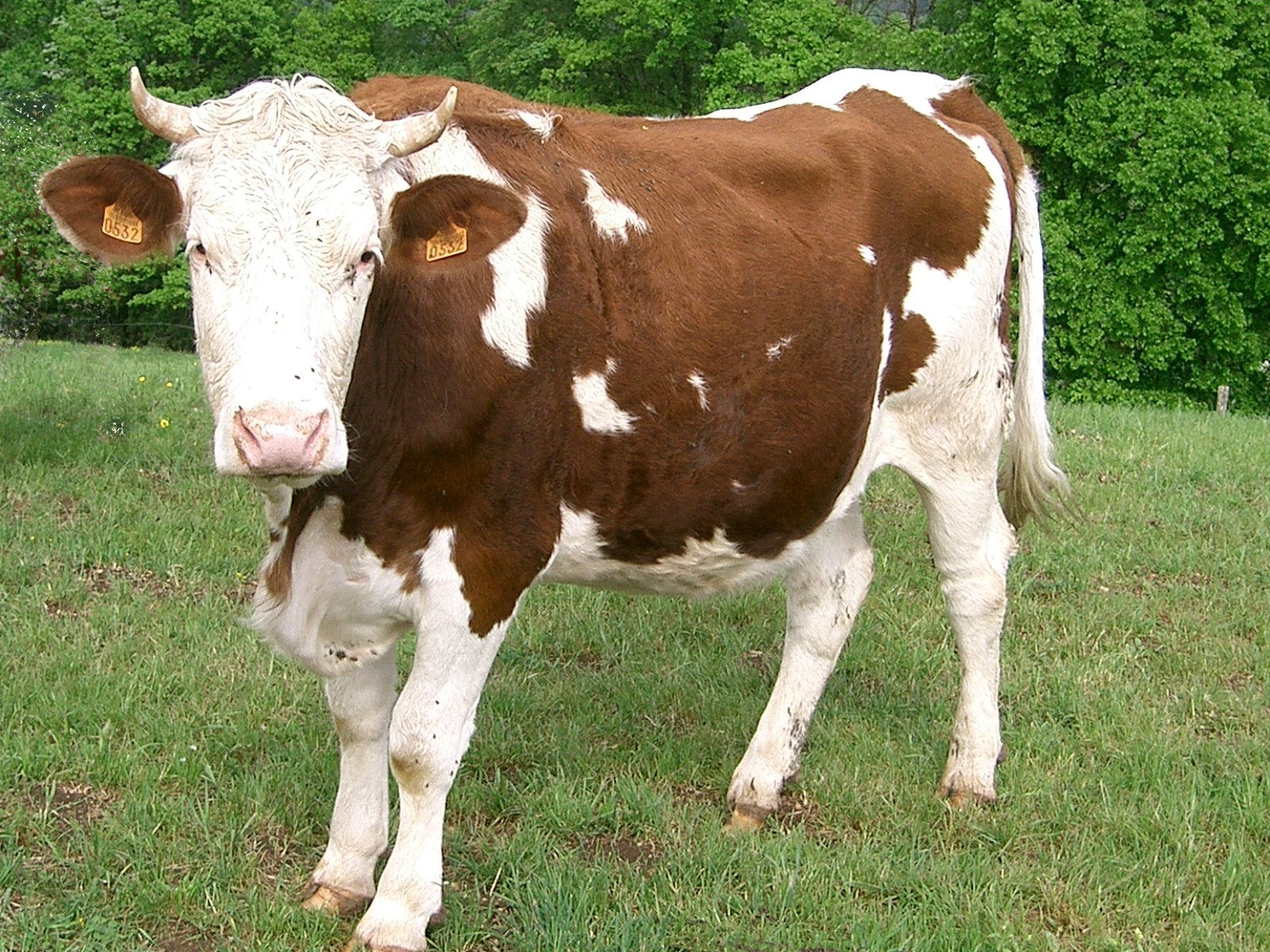 vache de race montbéliarde - plateau du Jura - France